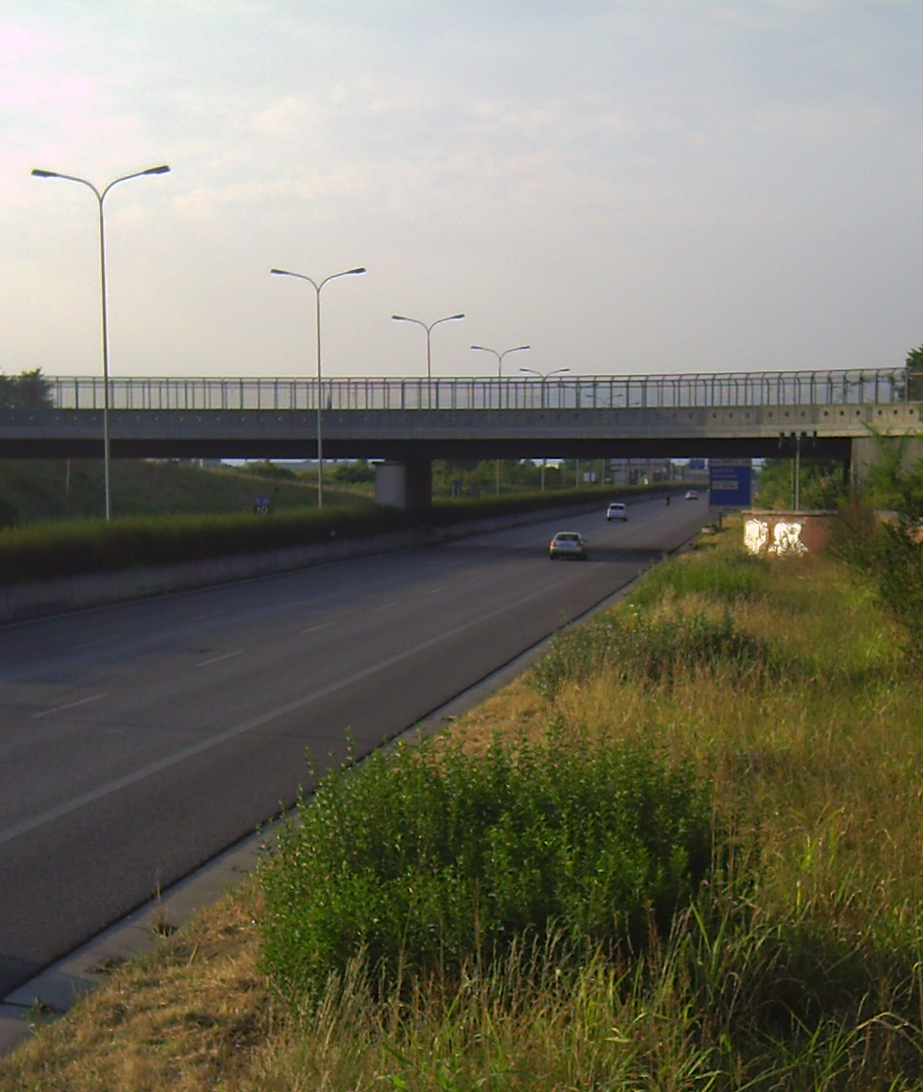 SS 36 near Carate Brianza